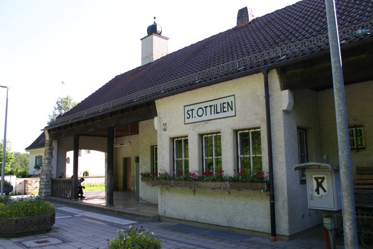 Bahnhof St. Ottilien